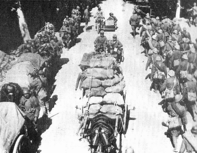 Truppe italiane e cecoslovacche in movimento dietro il fronte del Piave nel 1918